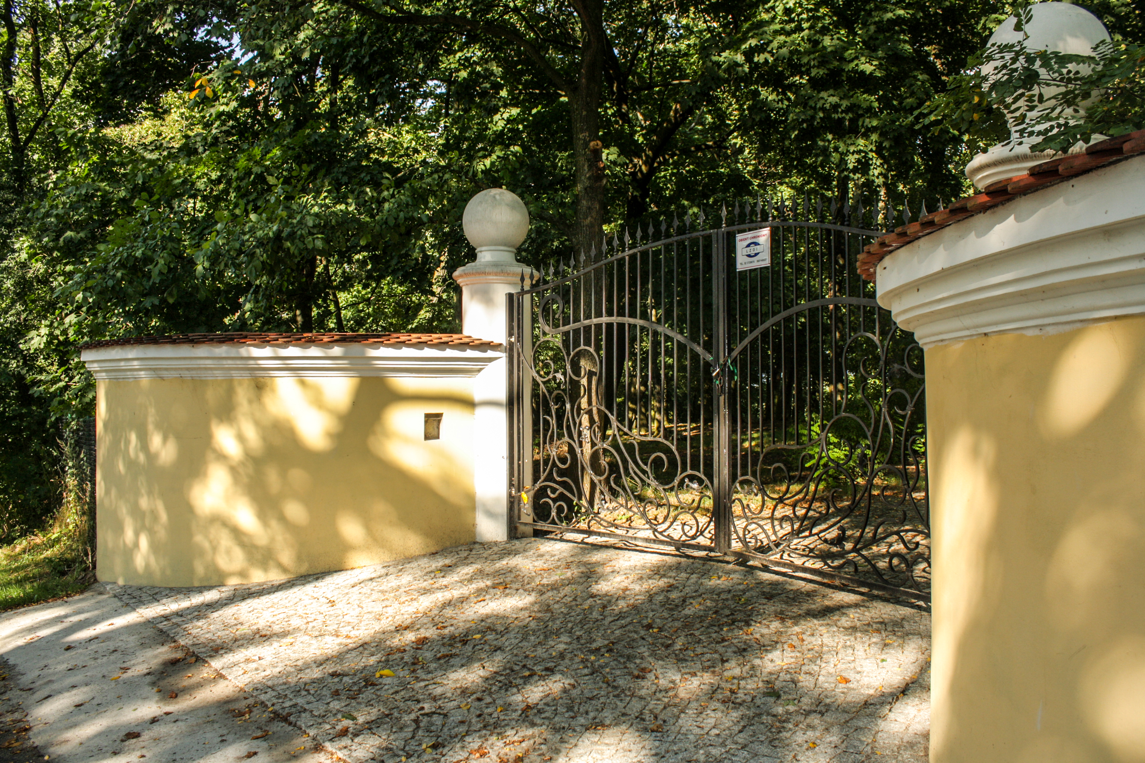 Brama do pałacu Malczewskich w Młodocinie